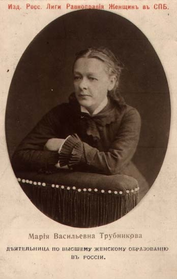 Photographie de Maria Troubnikova publiée par la Ligue pan-russe pour l'égalité des femmes